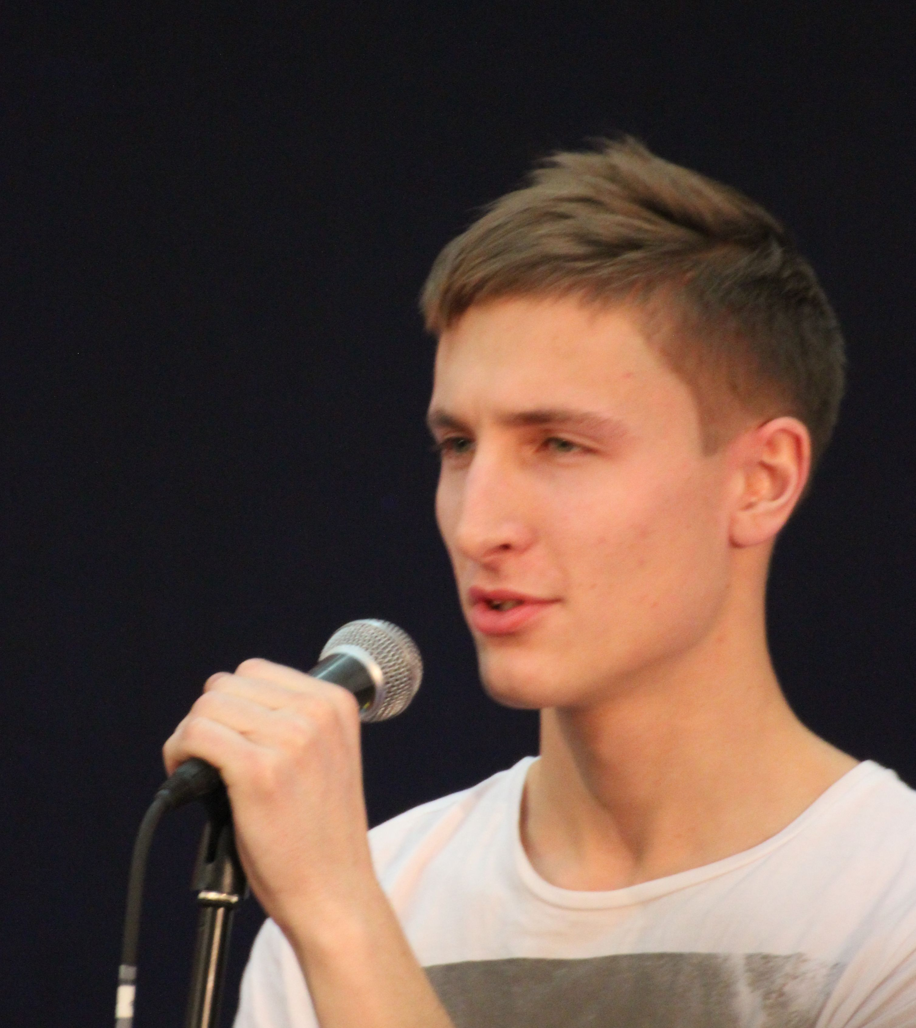 Karl-Erik Taukar esinemas Kristiine keskuses.